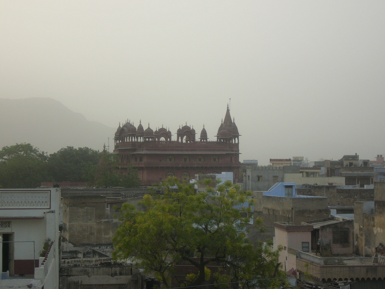 Ajmer India